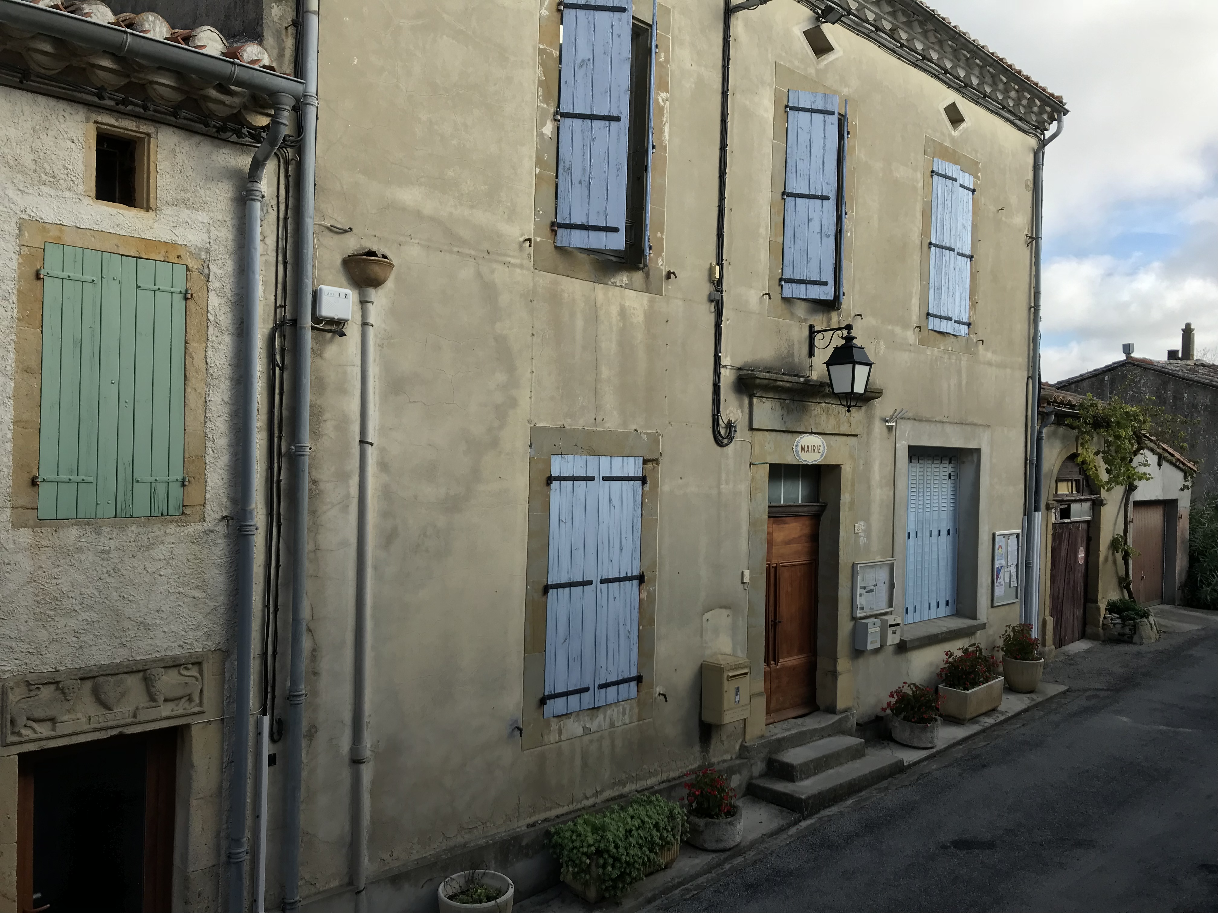 Novembre 2018